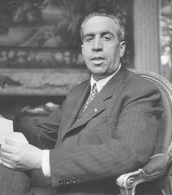 Rafael Sanchez-Guerra